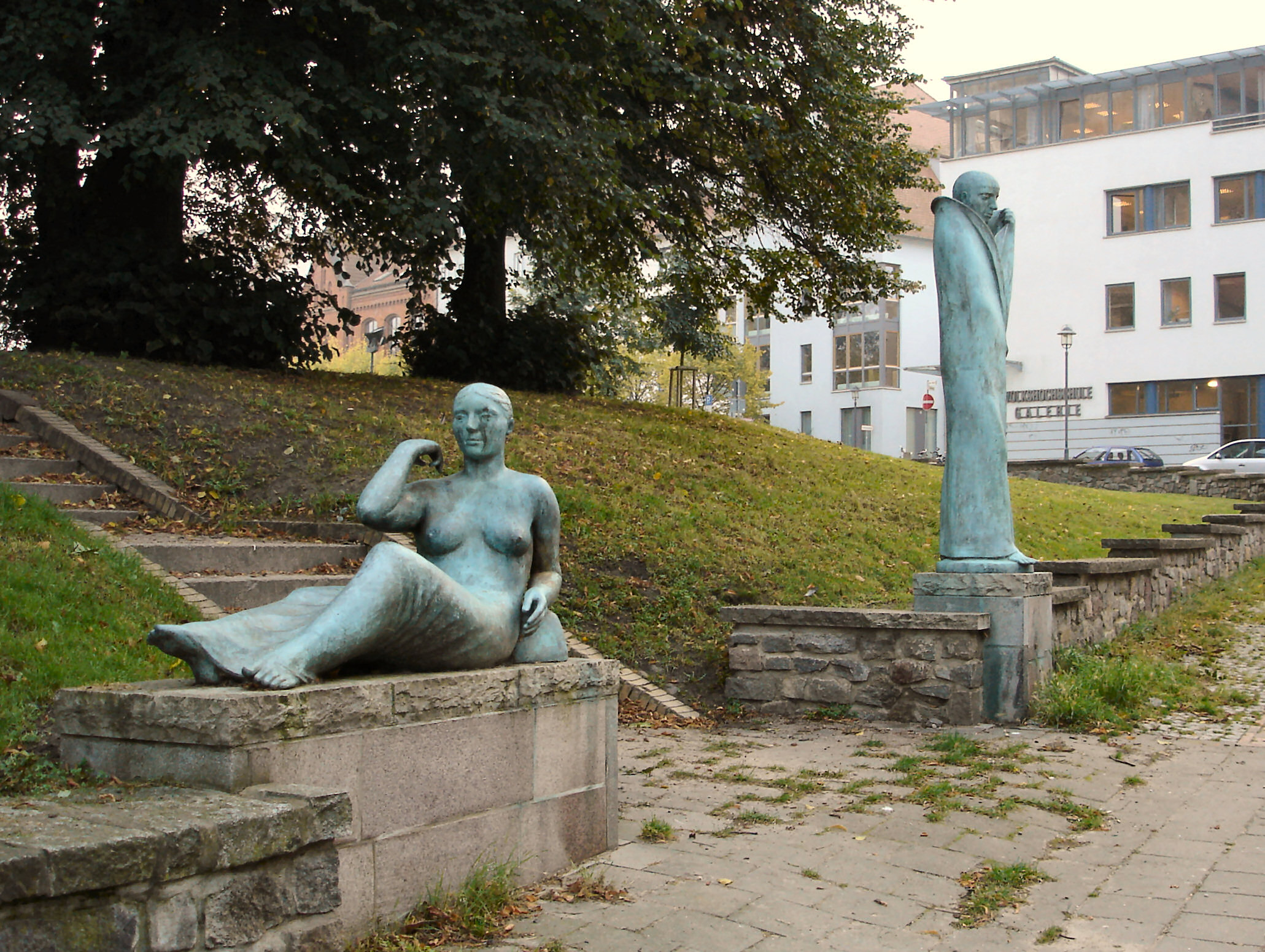 Liegende und Stehende Gewandfigur von W. Friedrich an der Petrikirche Rostock